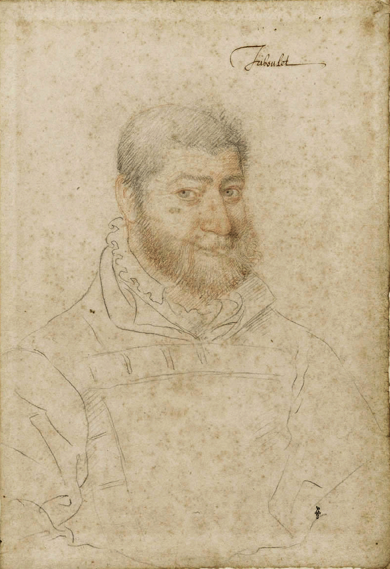 Triboulet. Chantilly, musée Condé. Fonds: Dessins. crayon noir ; sanguine